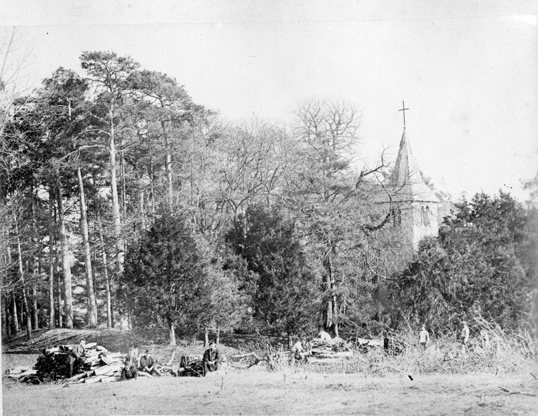 Clocher en forêt de la chapelle Saint-Nabor de Colombey vu depuis le parc à droite du château.